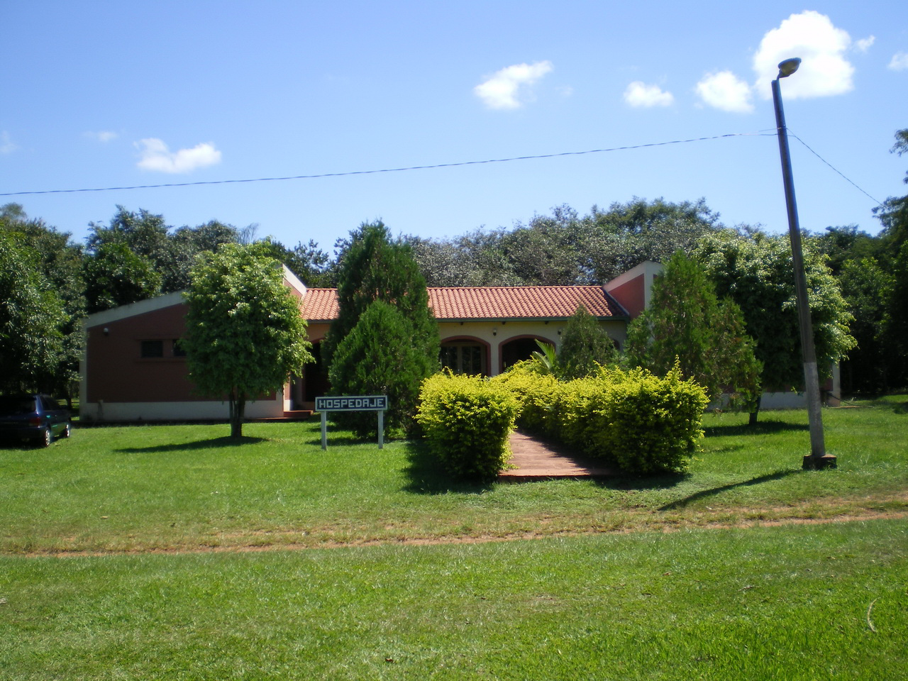 Fotos de los refugios y reservas de Itaipu, tomadas en los años 2007 y 2008 por mí